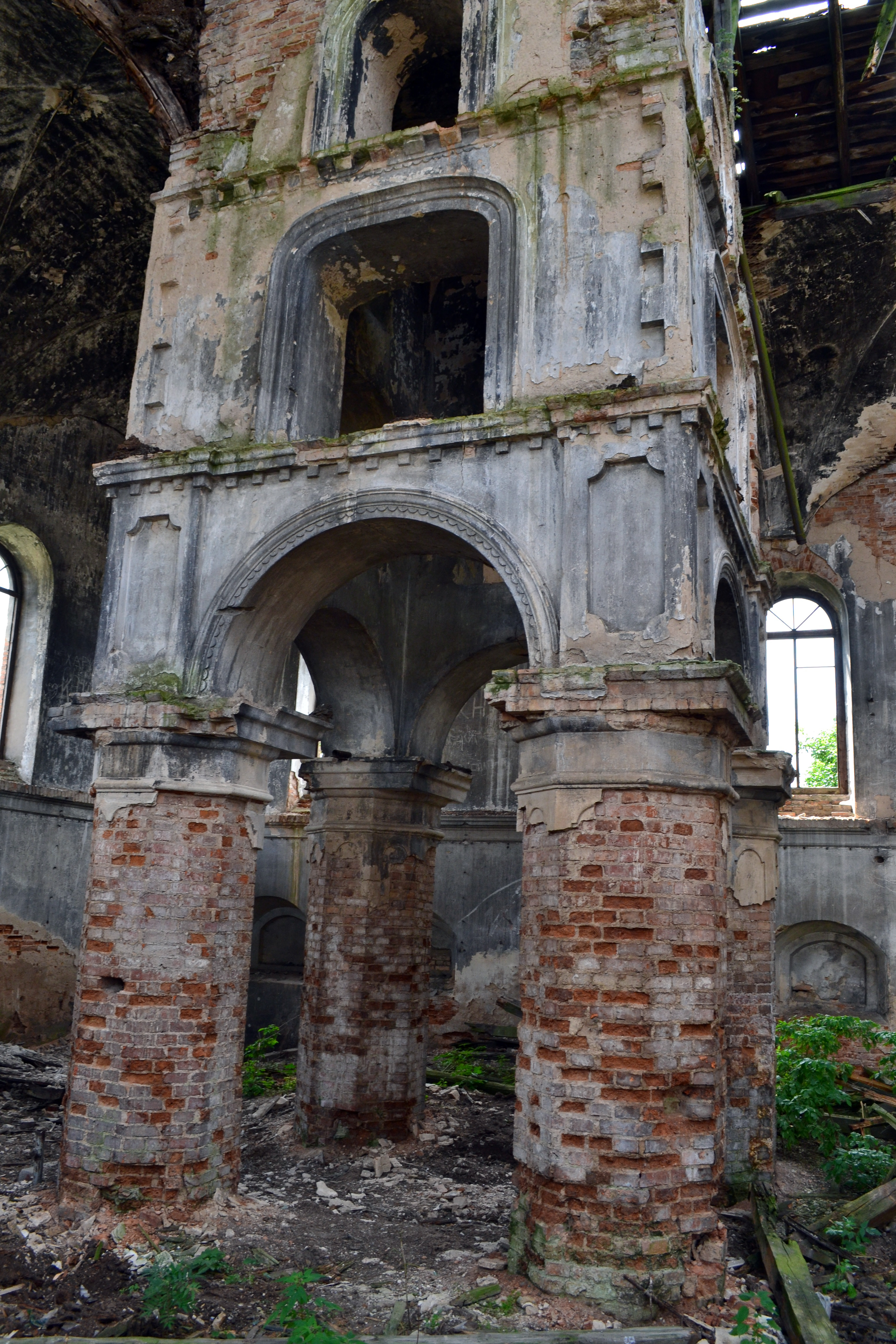 Беларуская (тарашкевіца): Ружанская сынагога This is a photo of Belarusian heritage monument. Reference number: 113Г000645 ( WLM)